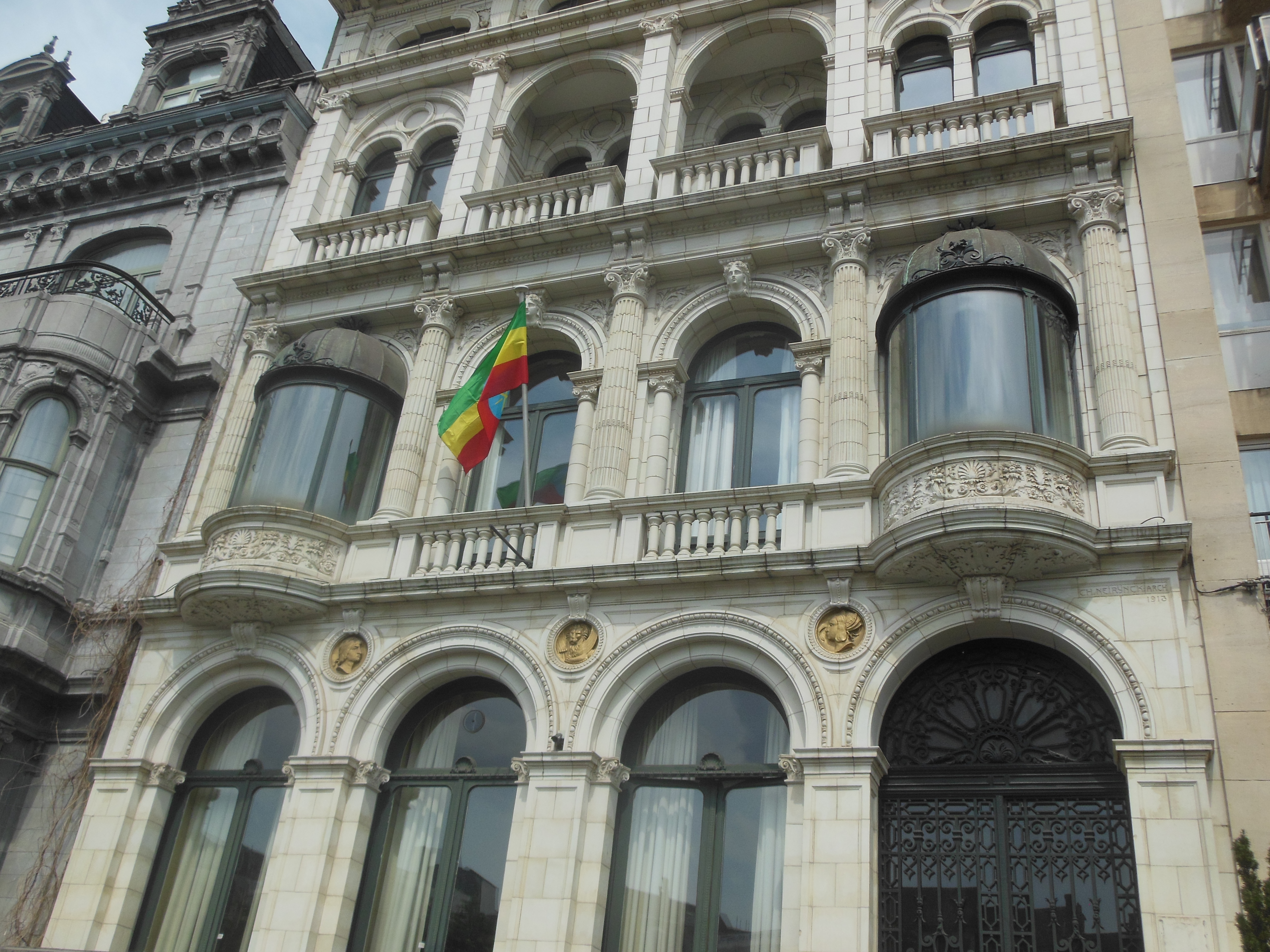 Avenue de Tervueren 64, Etterbeek